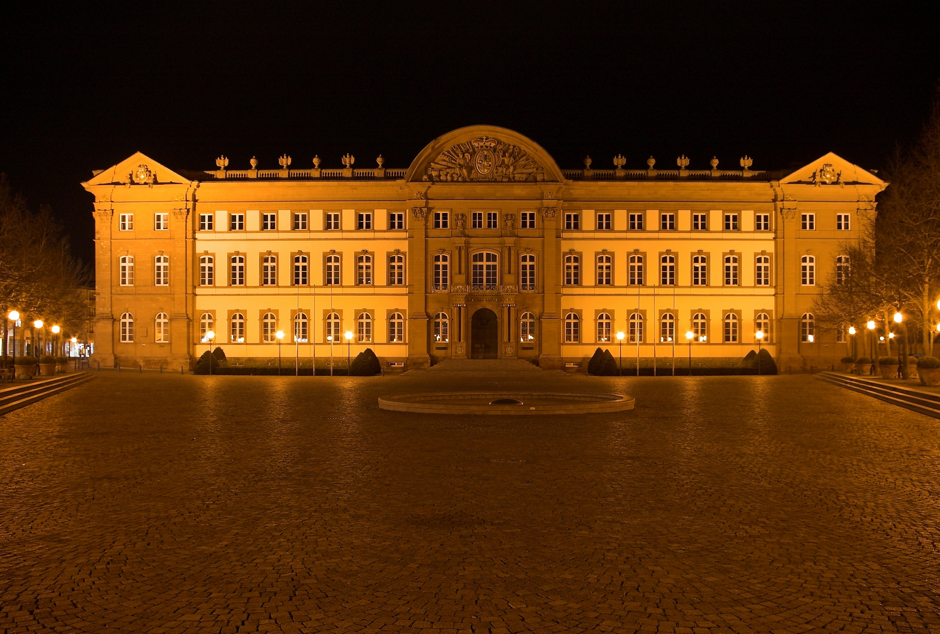 Das Zweibrücker Schloss bei Nacht (2007).